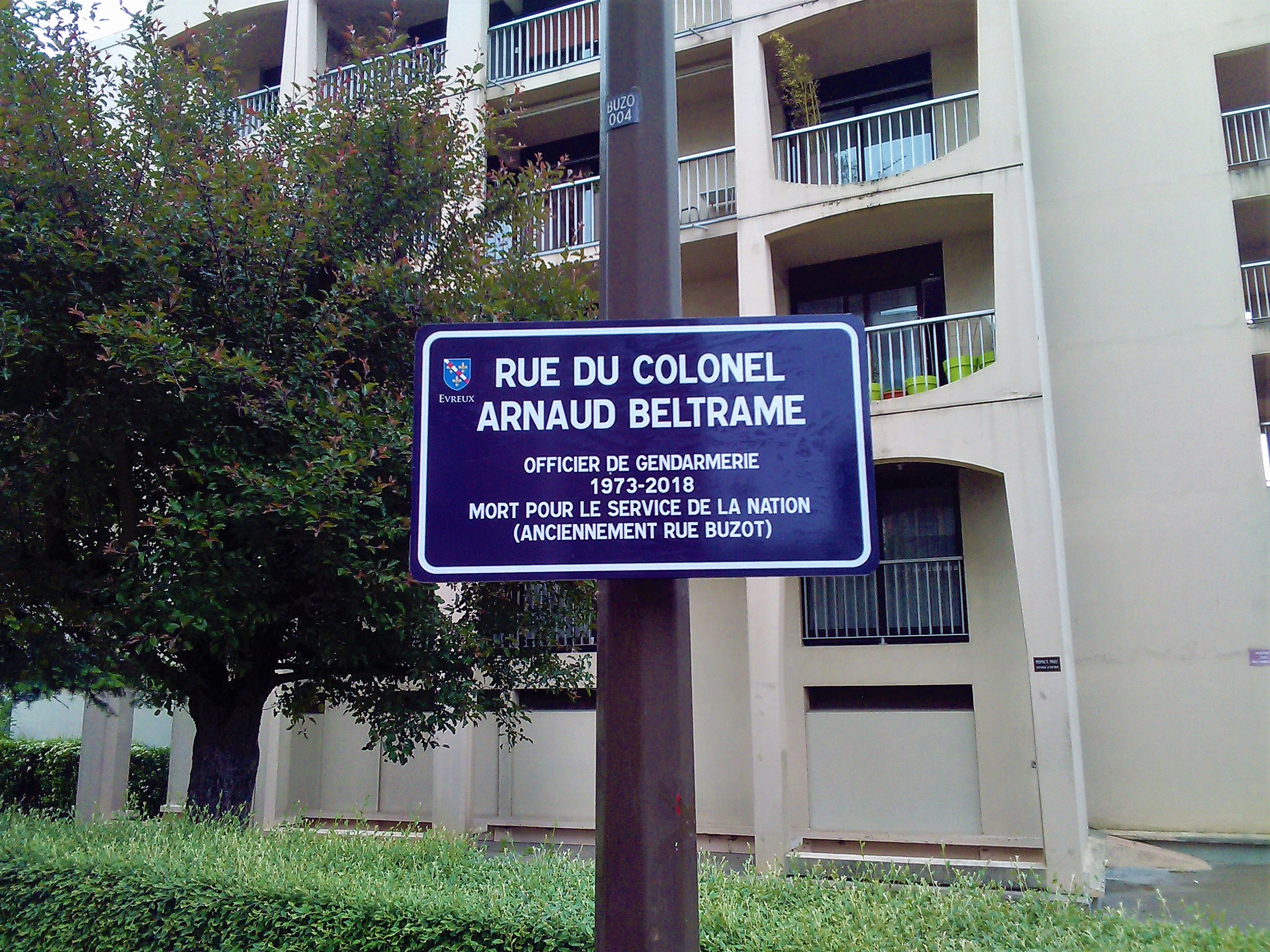 Plaque de rue à Evreux dédiée au colonel Beltrame.